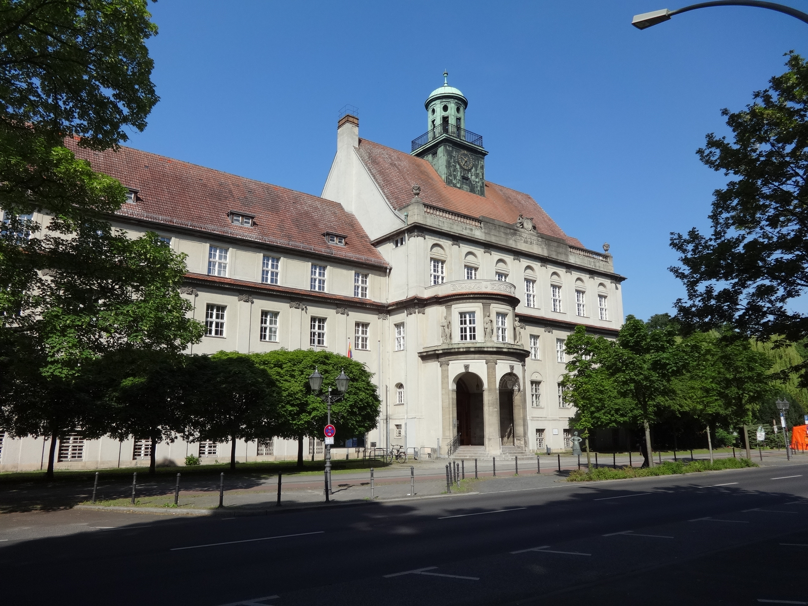 Rathaus Treptow in der Neuen Krugallee 4 im Berliner Bezirk Treptow-Köpenick, Ortsteil Plänterwald.